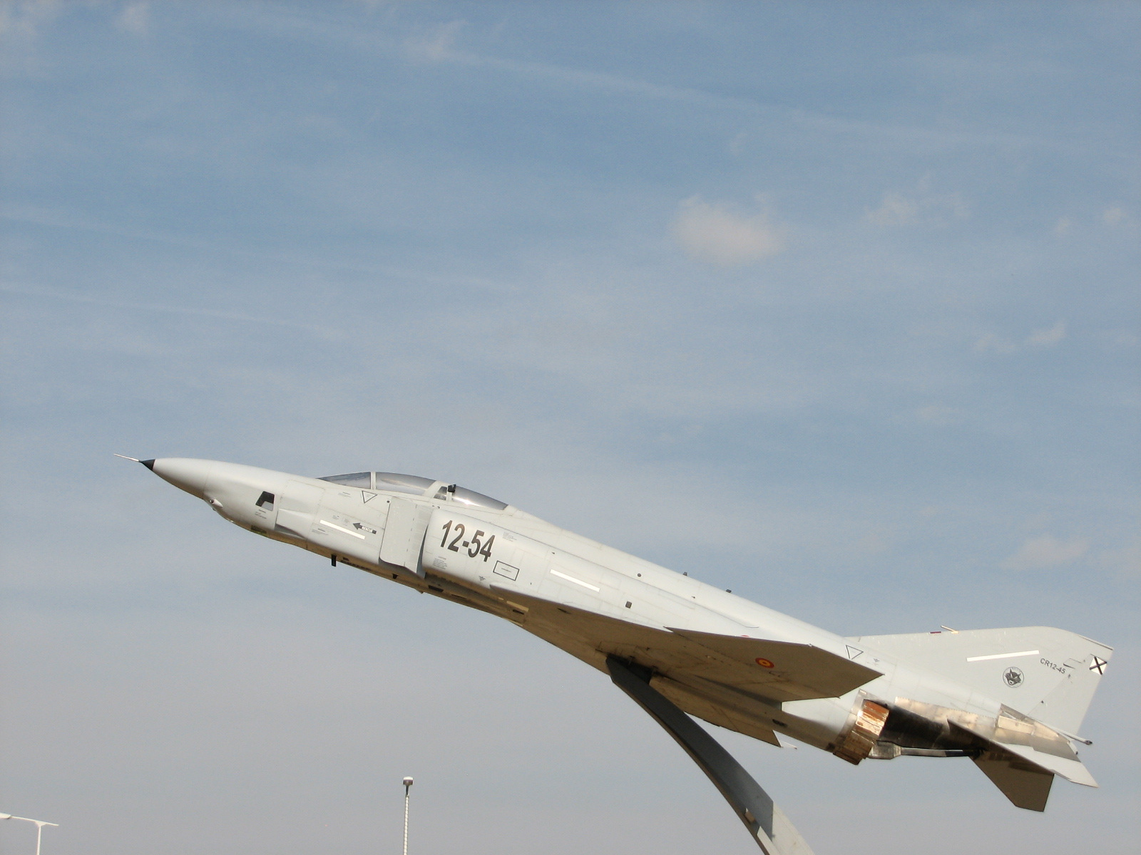 Avión RF-4C Phantom II dispuesto como monumento en una glorieta de entrada a Torrejón de Ardoz, Madrid.